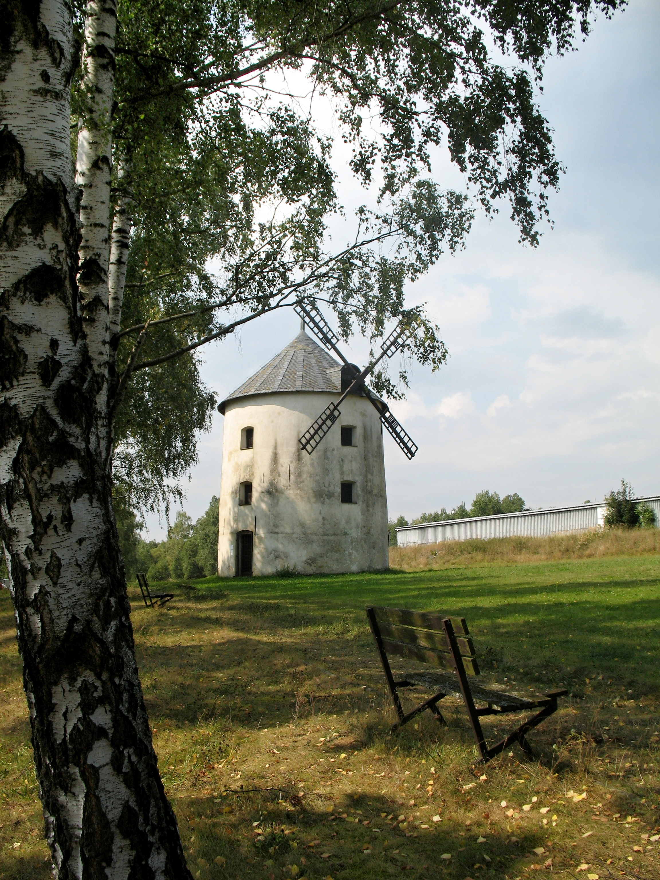 Větrný mlýn ve Městě Libavá, okres Olomouc